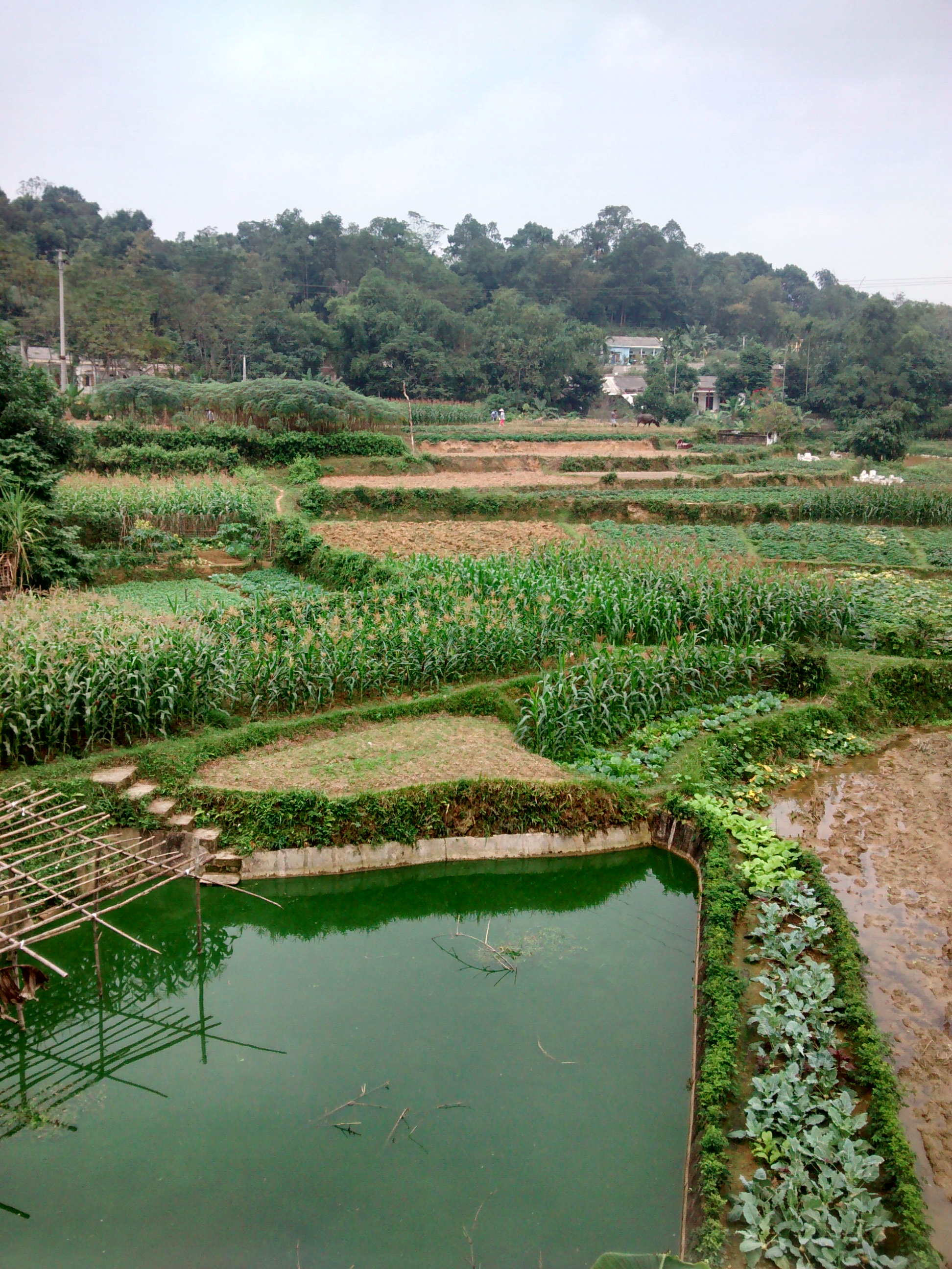 Cảnh đồng quê xã Thuỵ Liễu, huyện Cẩm Khê, tỉnh Phú Thọ